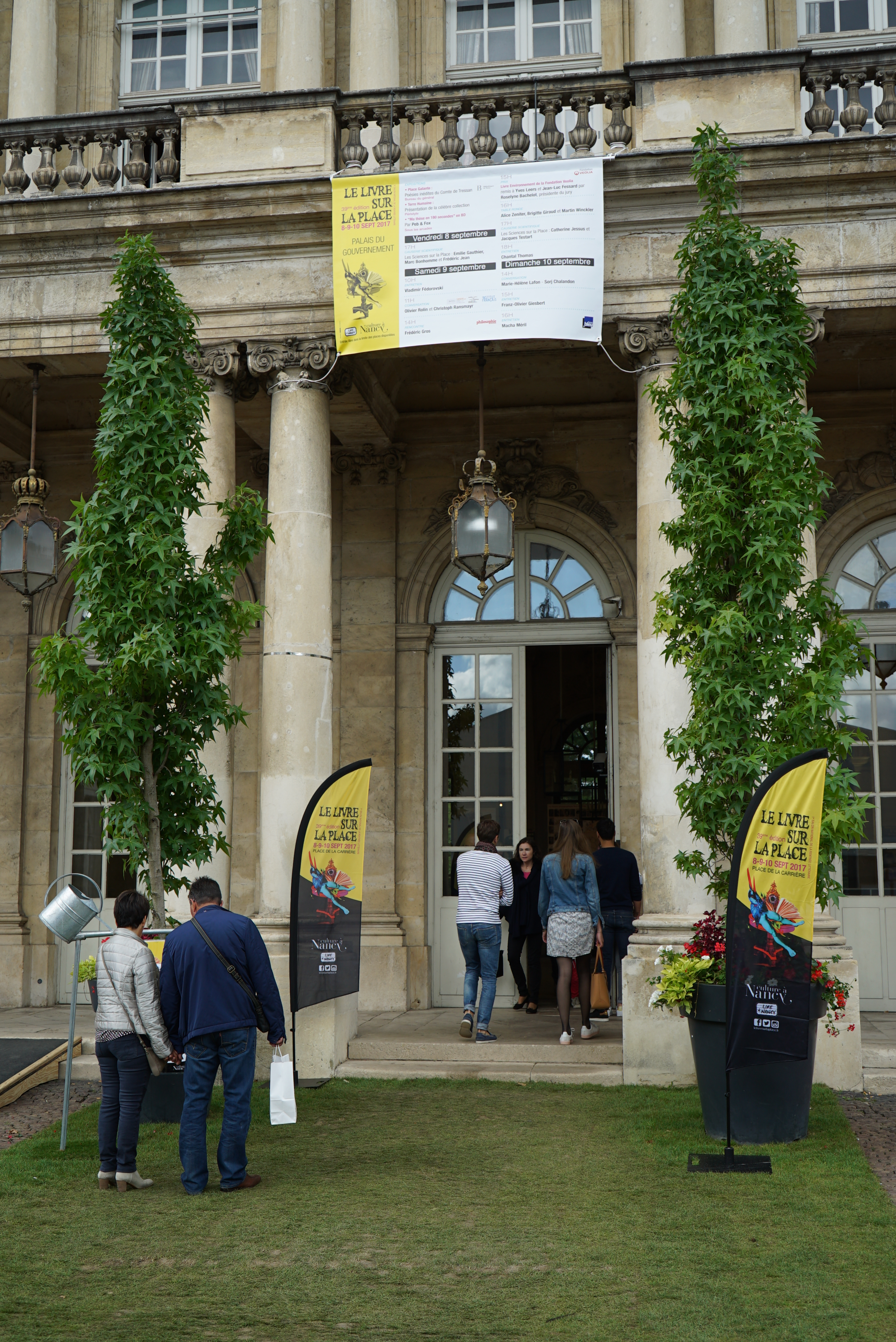 le palais du gouverneur en 2017.